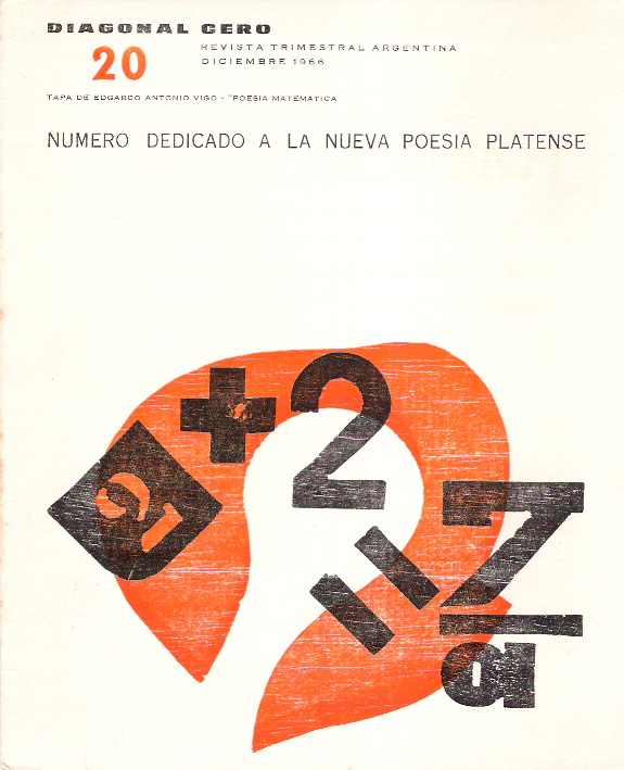 Tapa del número 20 de la revista experimental Diagonal Cero